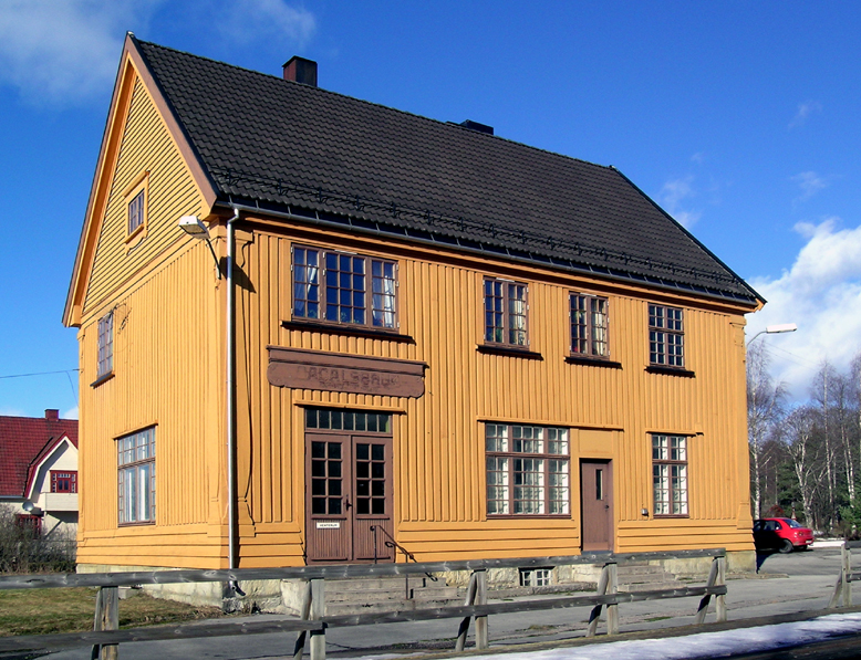 Ådalsbruk station, Løten, Norway.